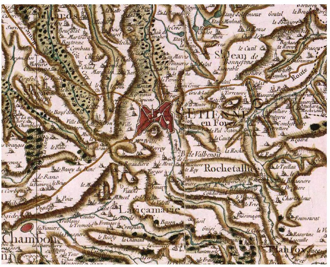 Carte de Cassini : extrait montrant la région de Saint-Étienne Libre de droits (carte publiée au XVIIIe siècle)